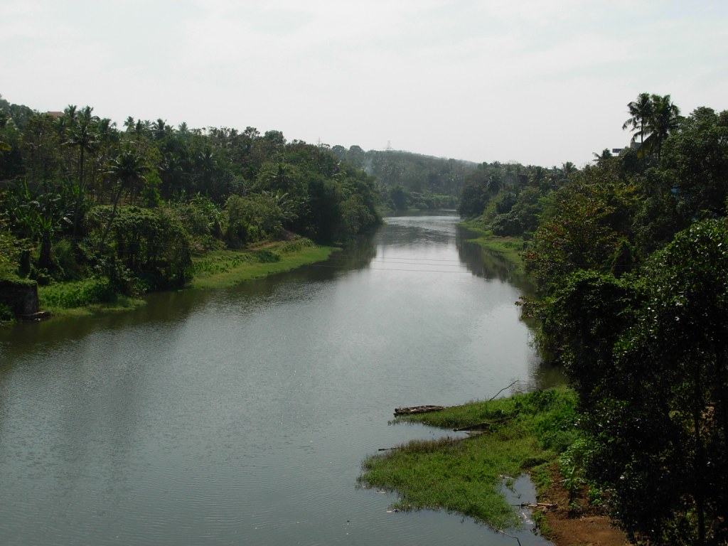 കല്ലടയാർ. പുനലൂർ പാലത്തിൽ നിന്നെടുത്ത കല്ലടയാർ ഒഴുകിവരുന്ന ദൃശ്യം.